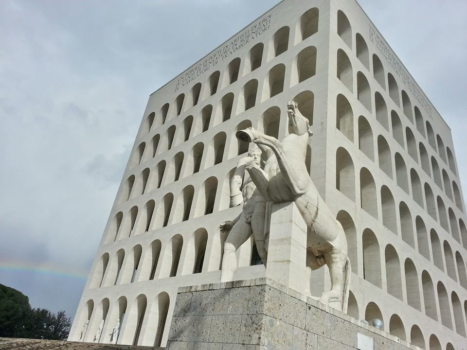 Roma è anche questo!